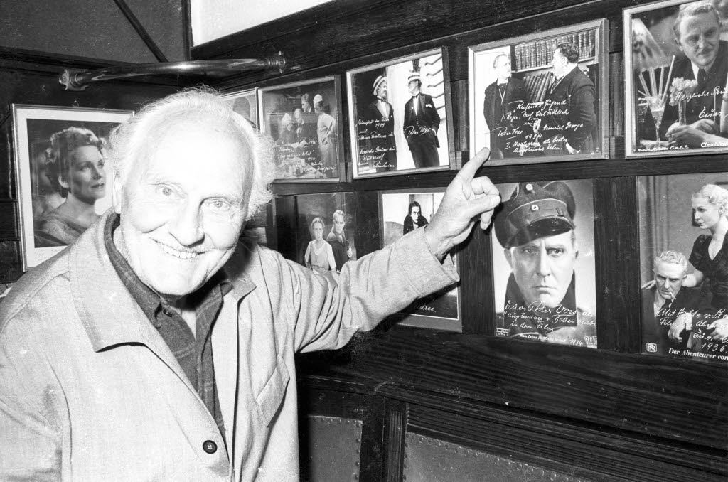 Die Fotos seiner Karriere hängen in seinem Elternhaus, Landkrug Stampe, wo er seinen Lebensabend verbringt.